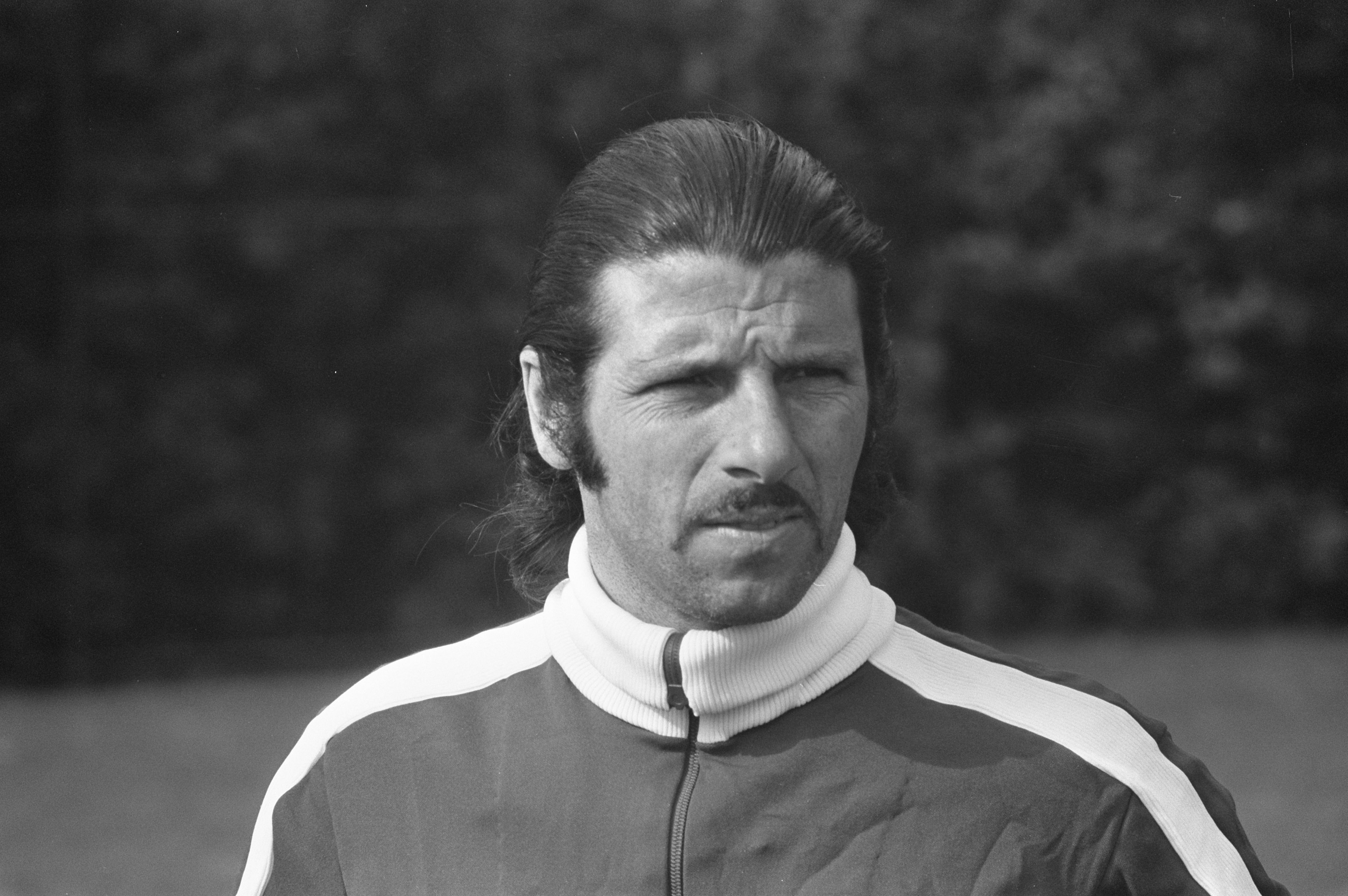 Collectie / Archief : Fotocollectie Anefo Reportage / Serie : [ onbekend ] Beschrijving : Training van Independiente voor wedstrijd tegen Ajax, trainer Ferreiro (kop) Datum : 26 september 1972 Trefwoorden : trainers Persoonsnaam : Independiente Instellingsnaam : AJAX Fotograaf : Verhoeff, Bert / Anefo Auteursrechthebbende : Nationaal Archief Materiaalsoort : Negatief (zwart/wit) Nummer archiefinventaris : bekijk toegang 2.24.01.05 Bestanddeelnummer : 925-9090